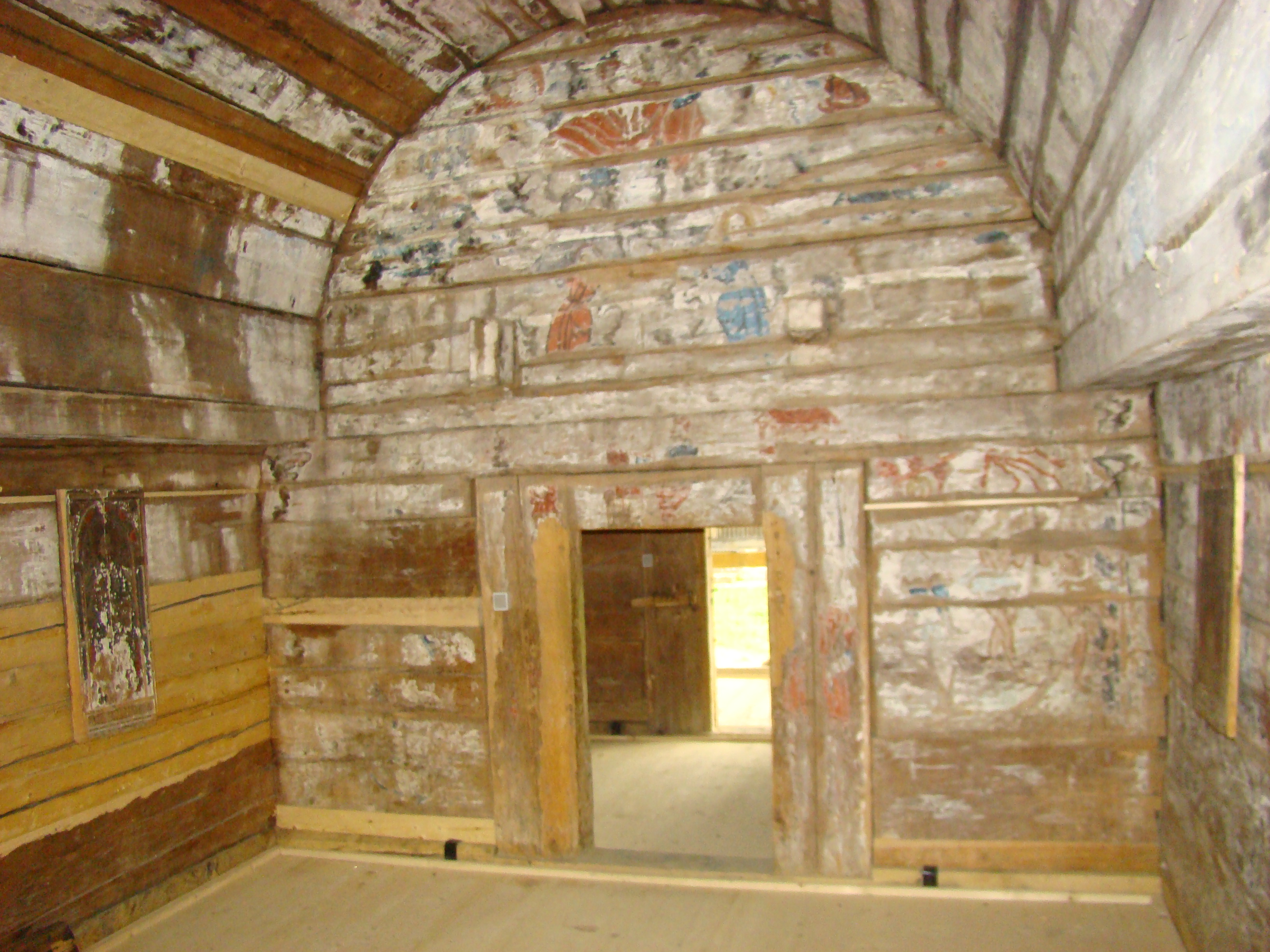 Biserica de lemn "Adormirea Maicii Domnului" a fostei mănăstiri "Izvoru Negru" , sat MOISEI 01